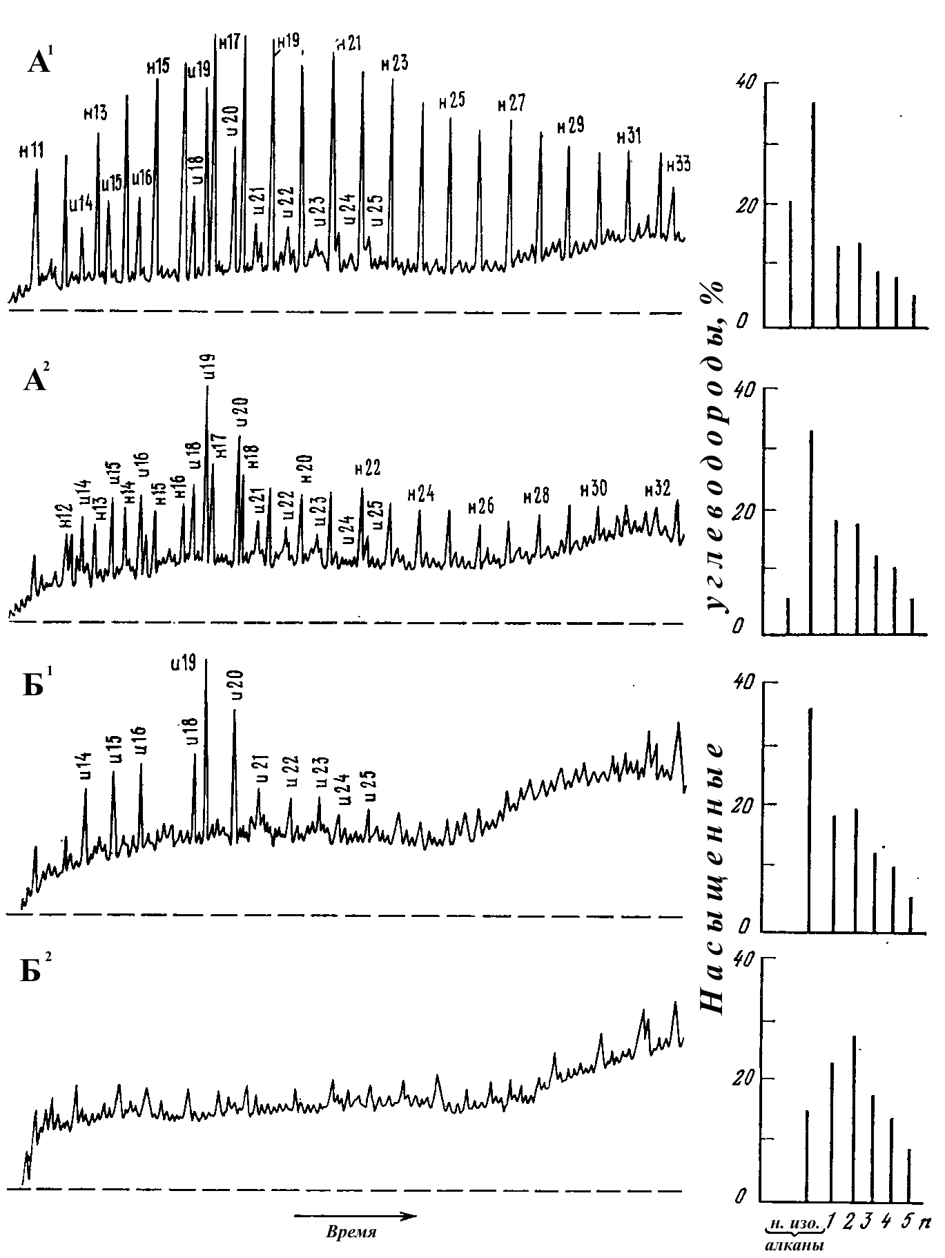 Хроматограммы нефтей различных химических типов Старогрозненского месторождения